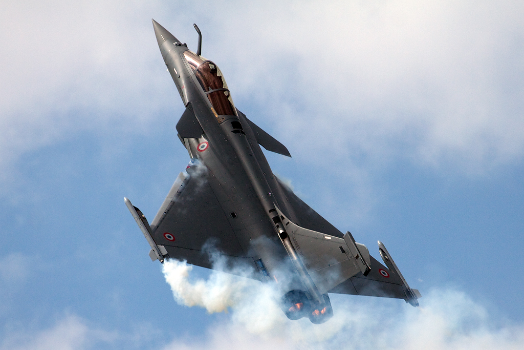 Rafale